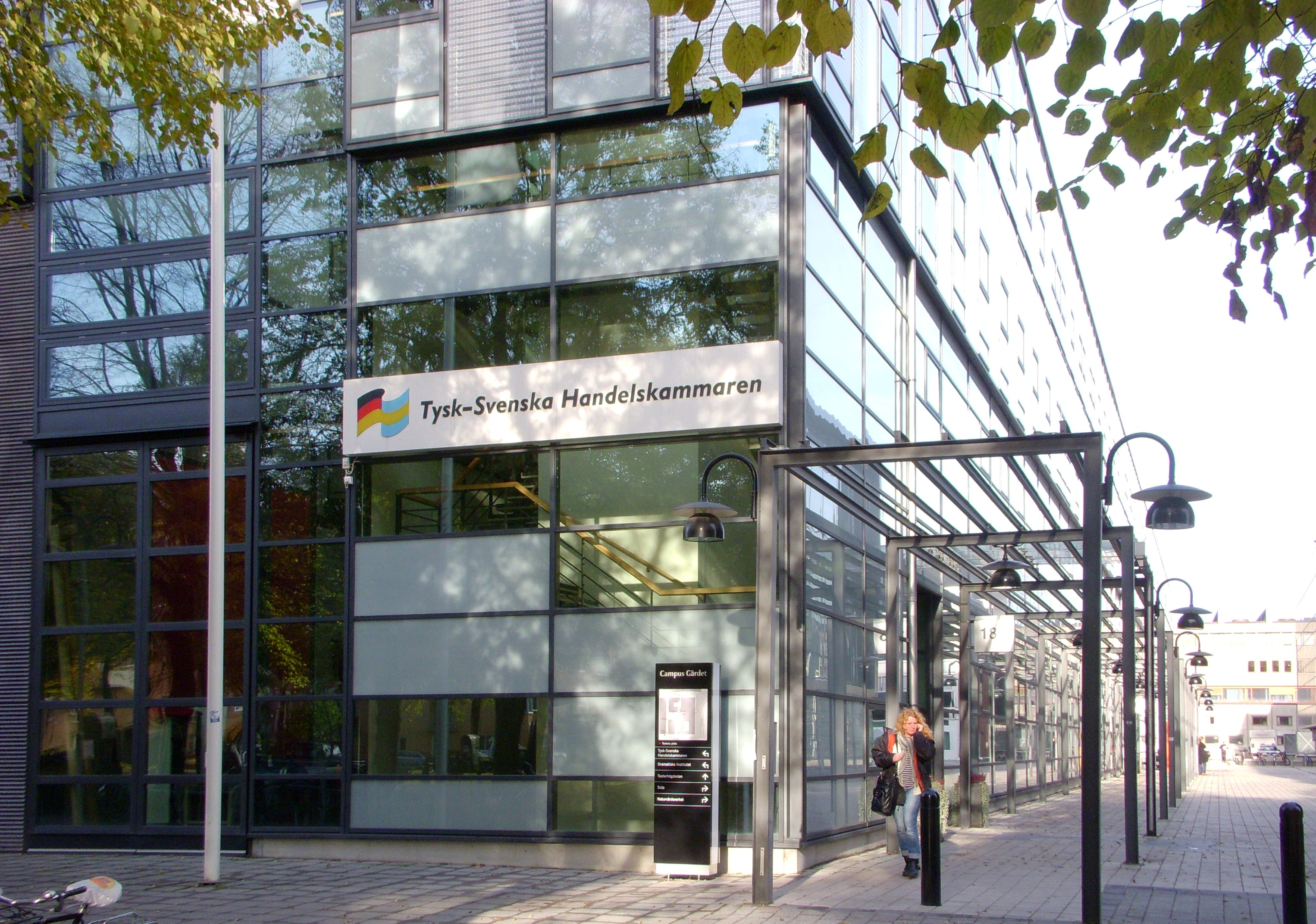 Tysk-Svenska handelskammaren, Valhallavägen 185, Stockholm